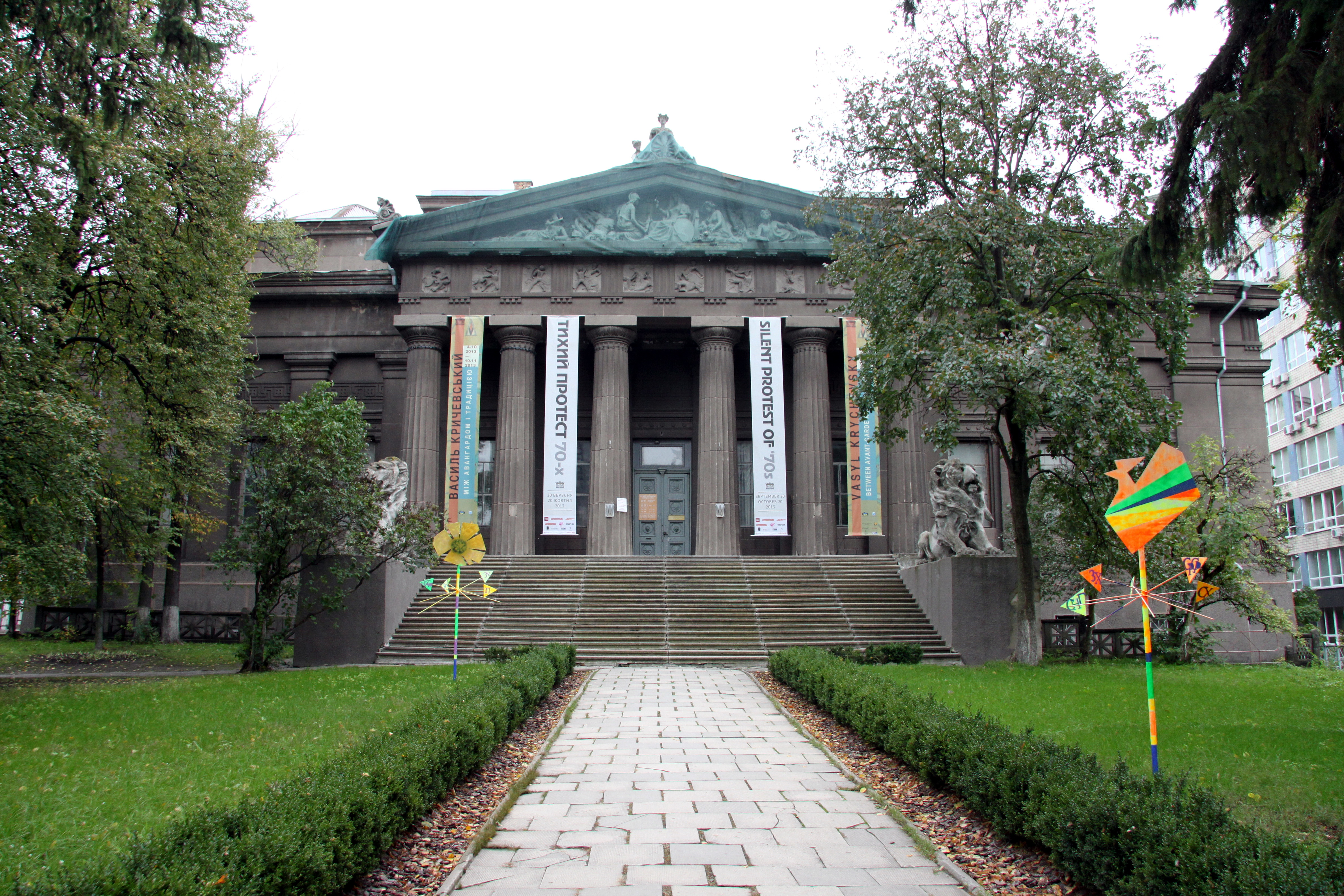 Будинок-музей старожитностей та мистецтв (кол. Художньо-промисловий та науковий музей), Київ, Грушевського Михайла вул., 6